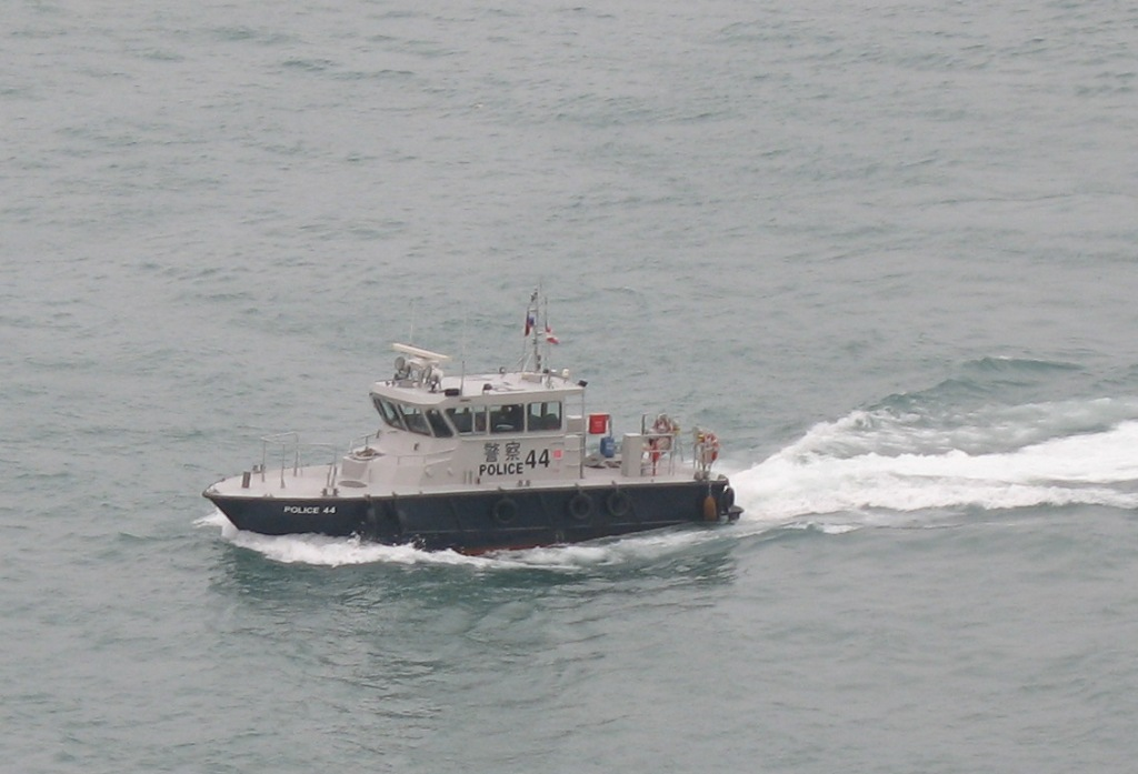 中文（香港）: 香港警務處水警輪44號